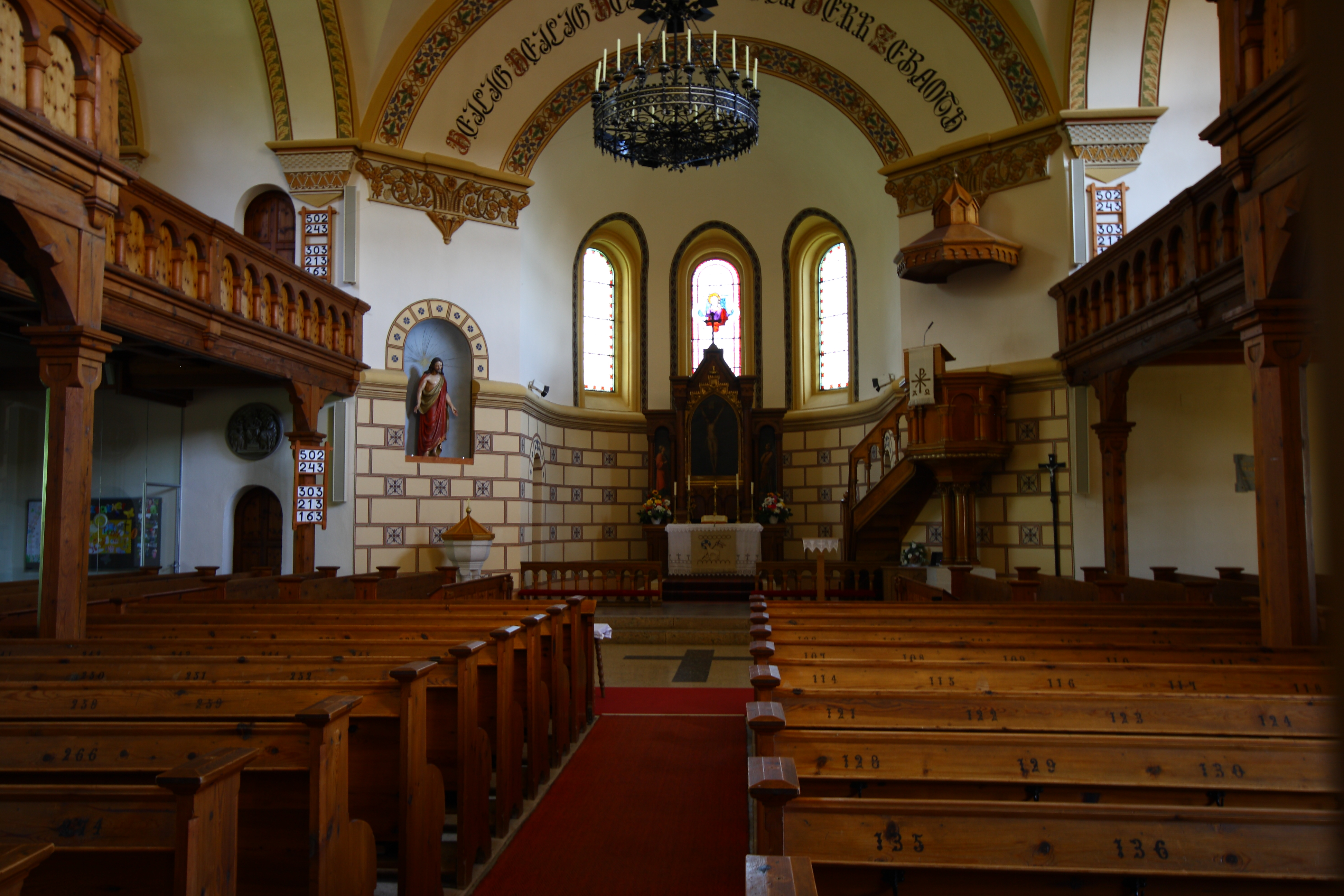 Evang. Pfarrkirche A.B.